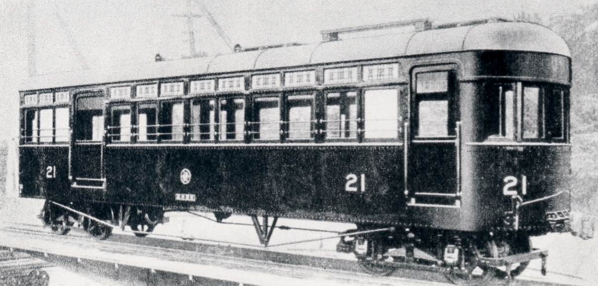 竣功したばかりの電車